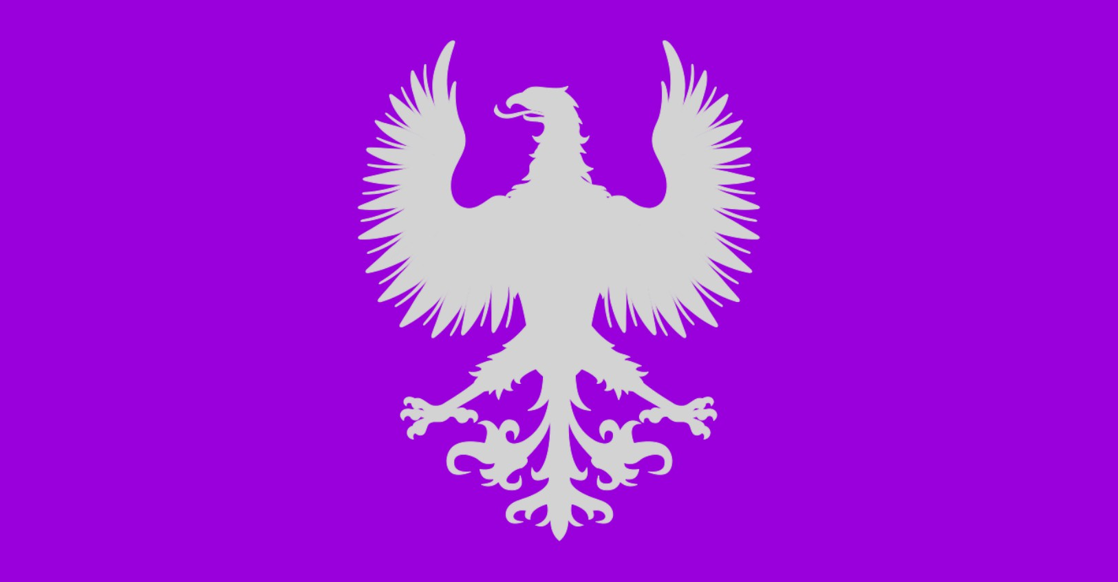 House Mallister-Game of Thrones Flag